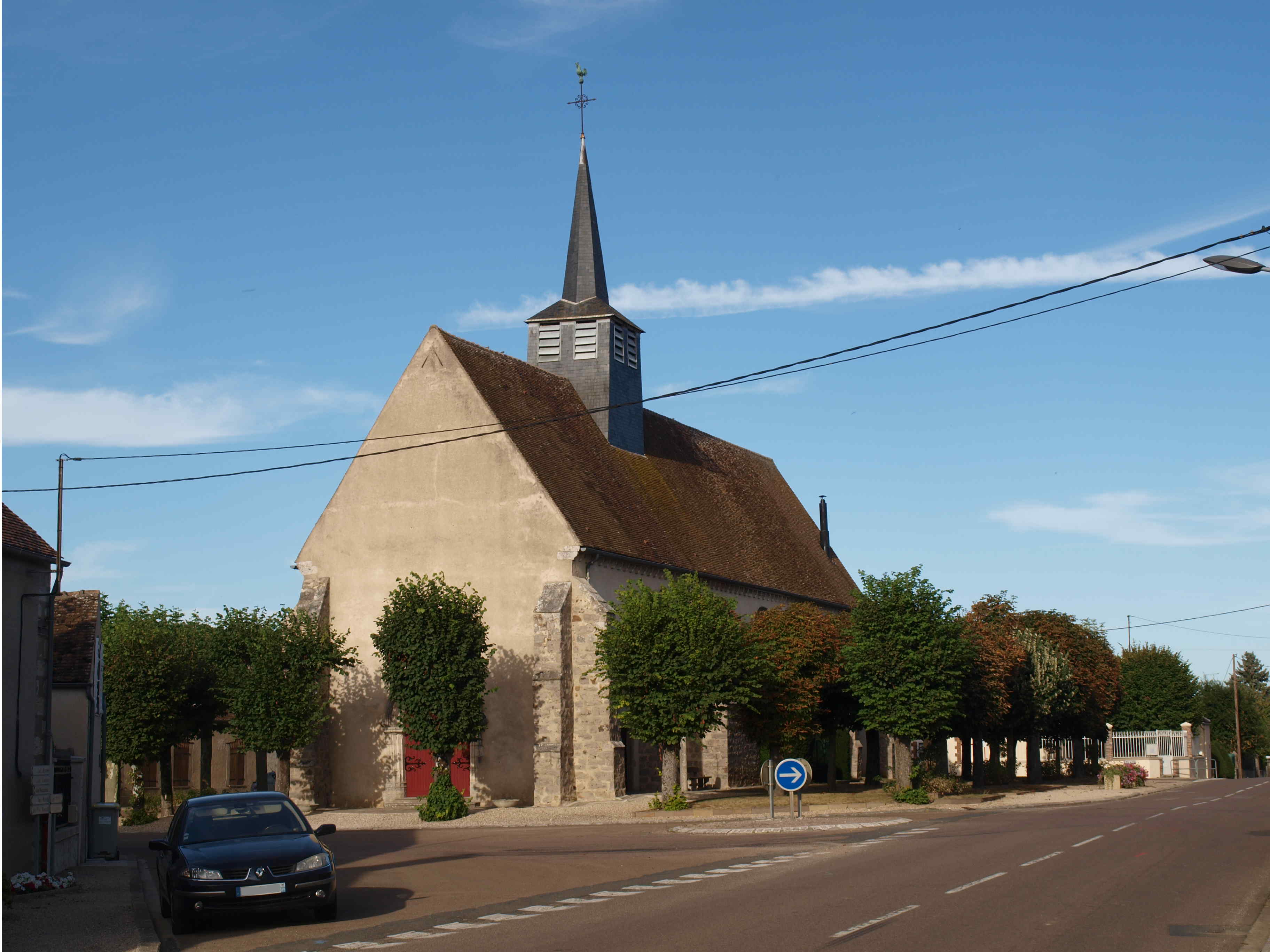 Jouy (Yonne; France) ; l'église.